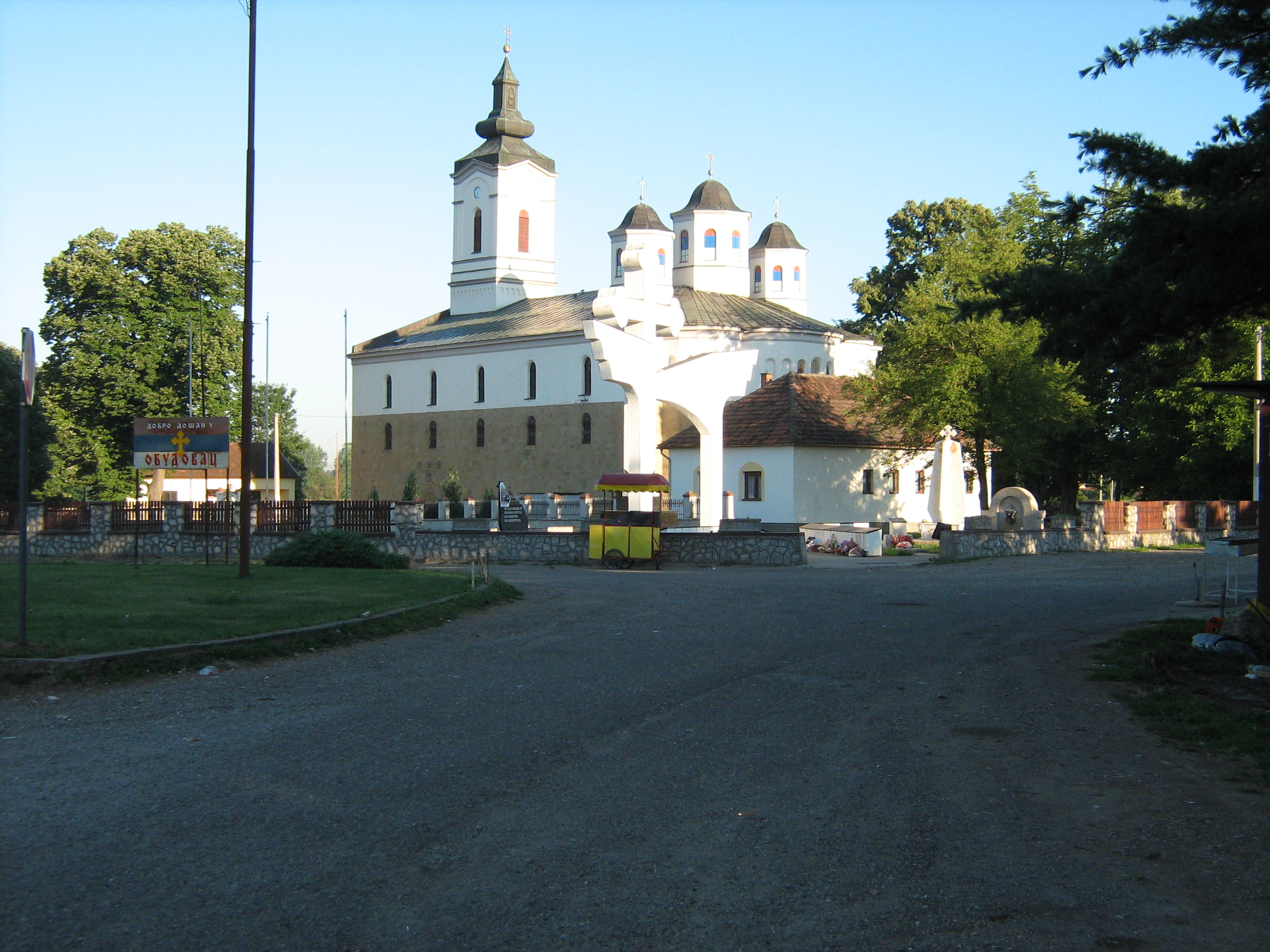 Сам сам сликао